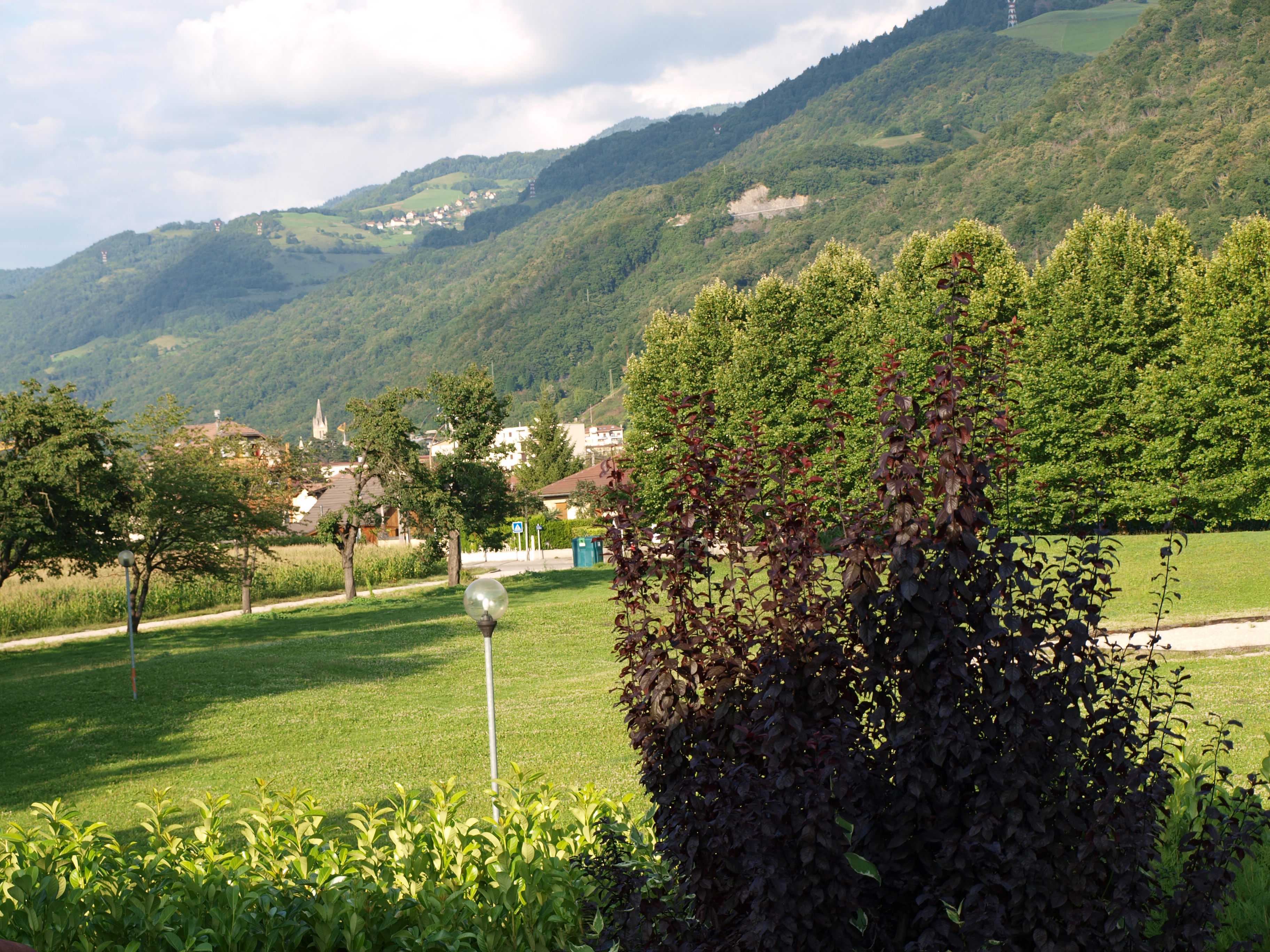 ( Quartier les Barrières )